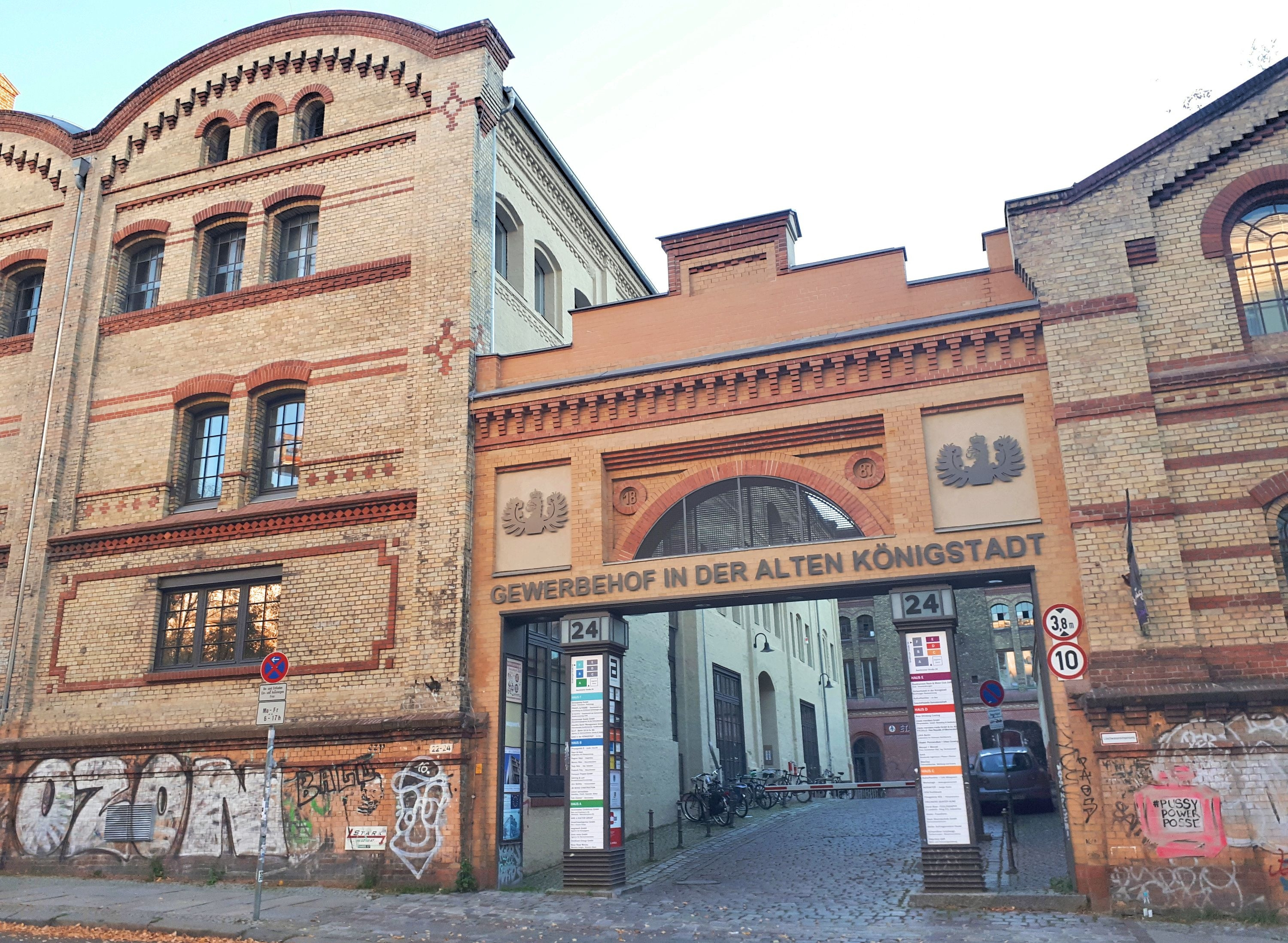 Eingang des Königstadt Gewerbehofs, Saarlandstr. 23 in Berlin-Prenzlauer Berg.